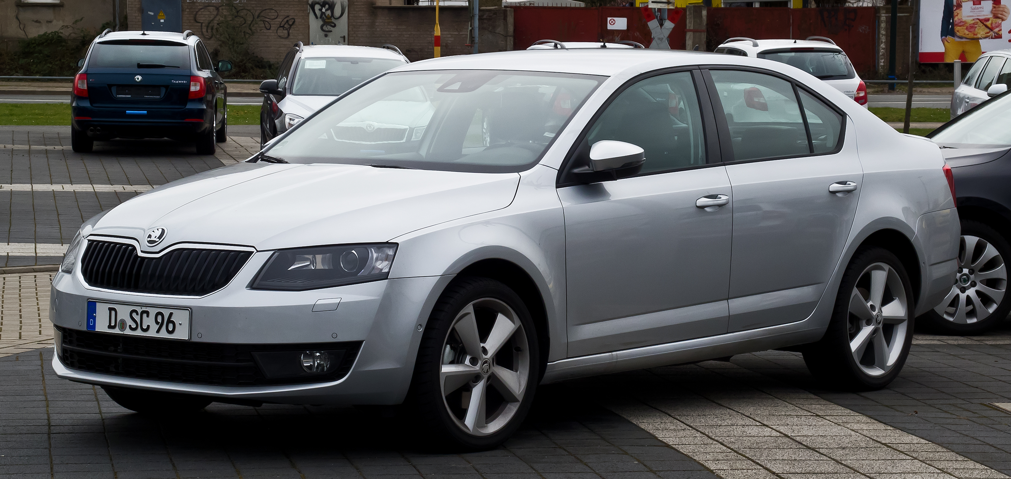 Skoda Octavia 1.8 TSI Green tec Elegance (III)